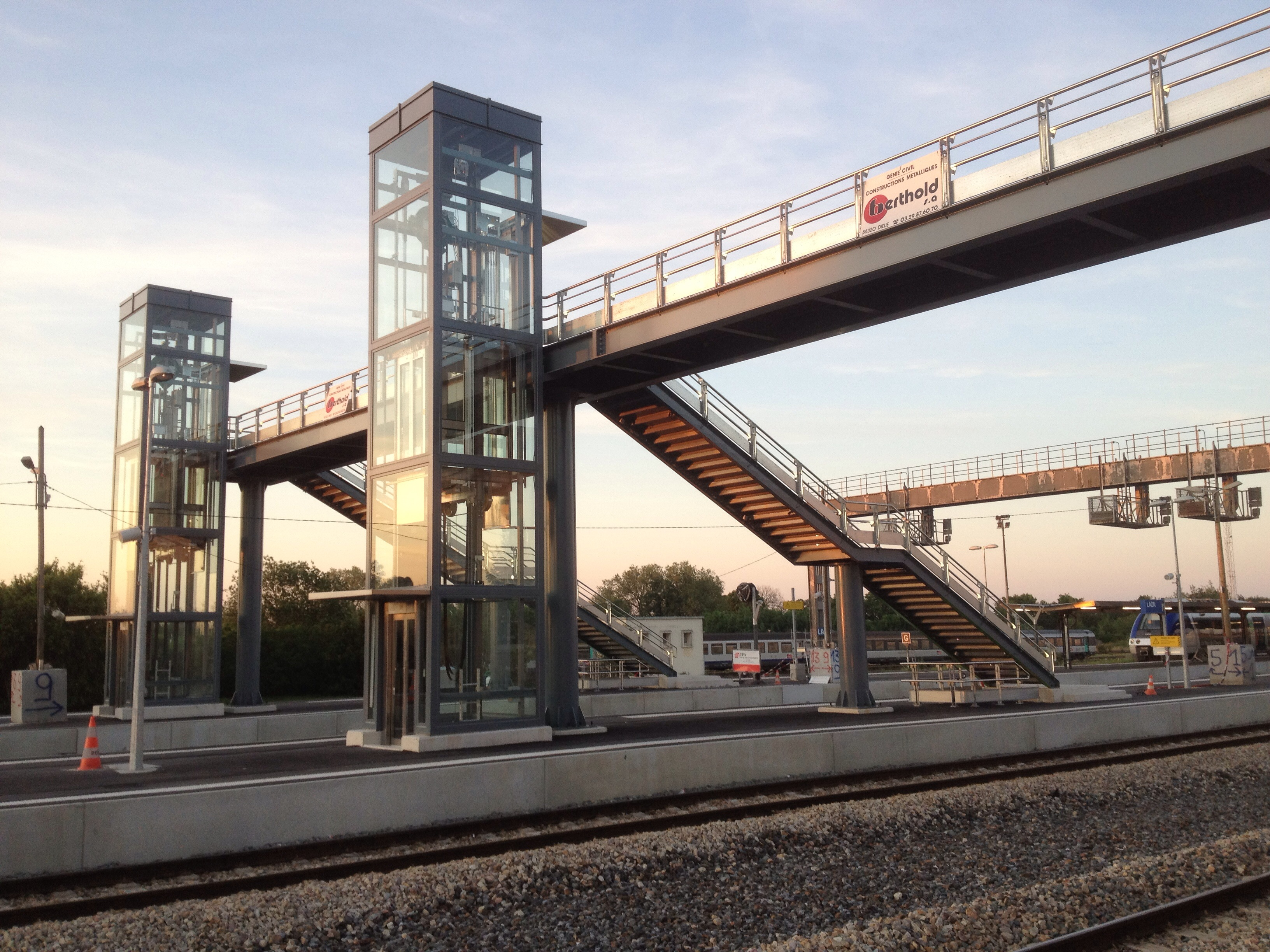 Nouveaux aménagements gare de Laon en 2011-2012